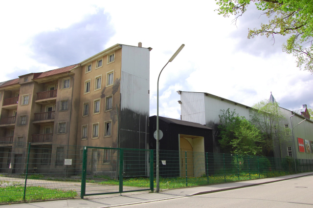 Bavaria-Filmateliers: Kulissen, 8 km from M?en, Deutschland (Zone 32). Geb?ekulissen auf dem Gel?e der Bavaria-Film in Geiselgasteig bei Gr?ld.